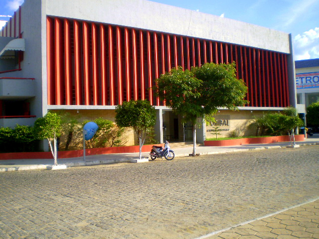 Mini Shopping da cidade de Pombal, inaugurado em 2006 no Centro de Pombal